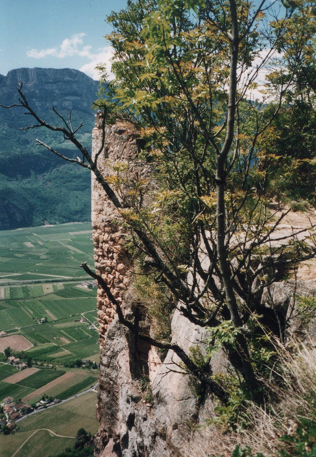 Burgruine Greifenstein über dem Etschtal in Südtirol, Teilansicht